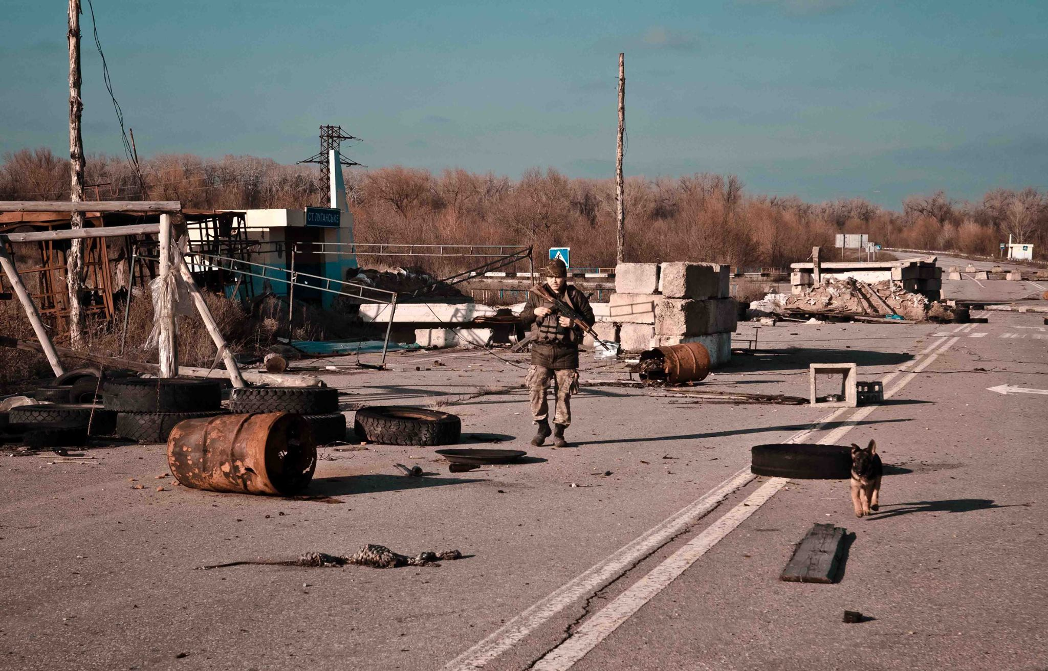 Anti-terrorist operation in eastern Ukraine (War Ukraine) Фото: Євген Силкін